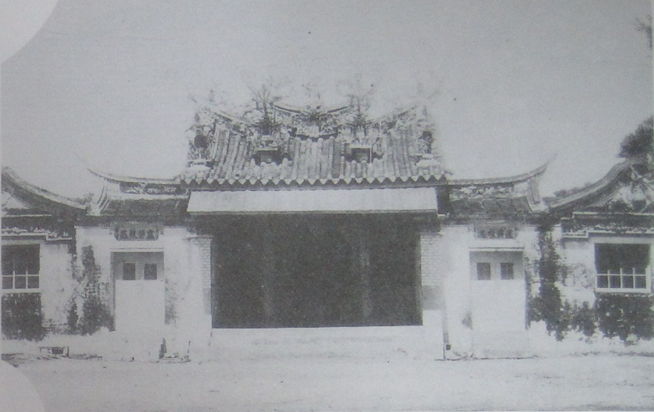 1933年前的大灣廣護宮（王公廟）